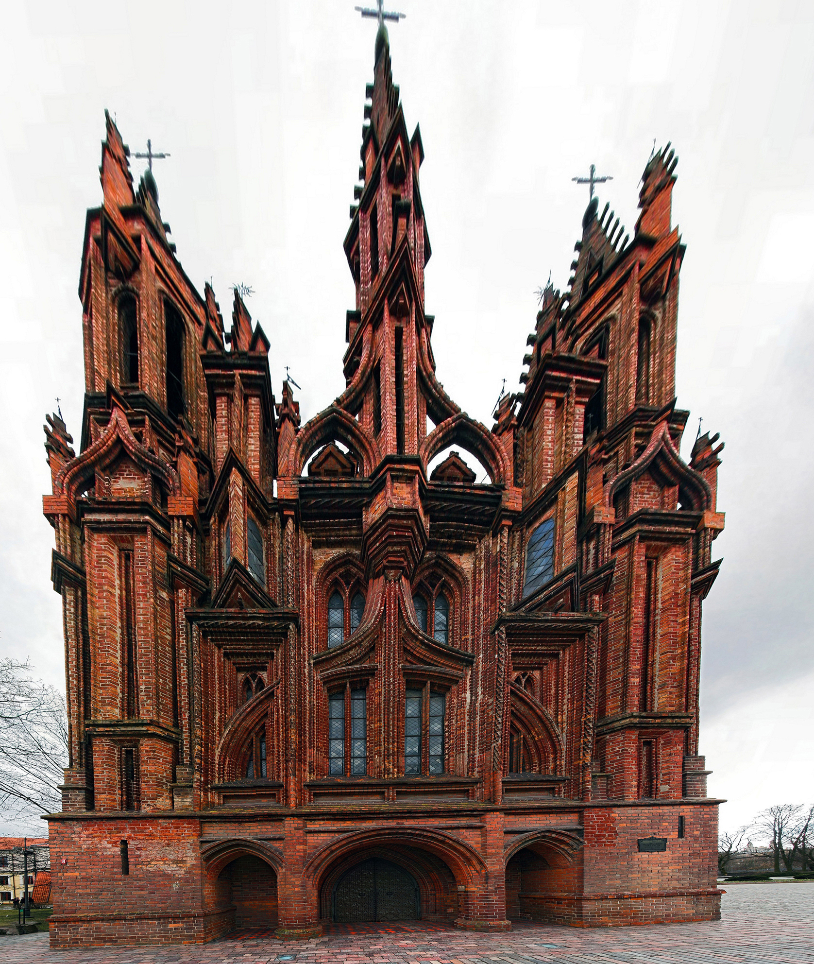 St. Annes Church in Vilnius